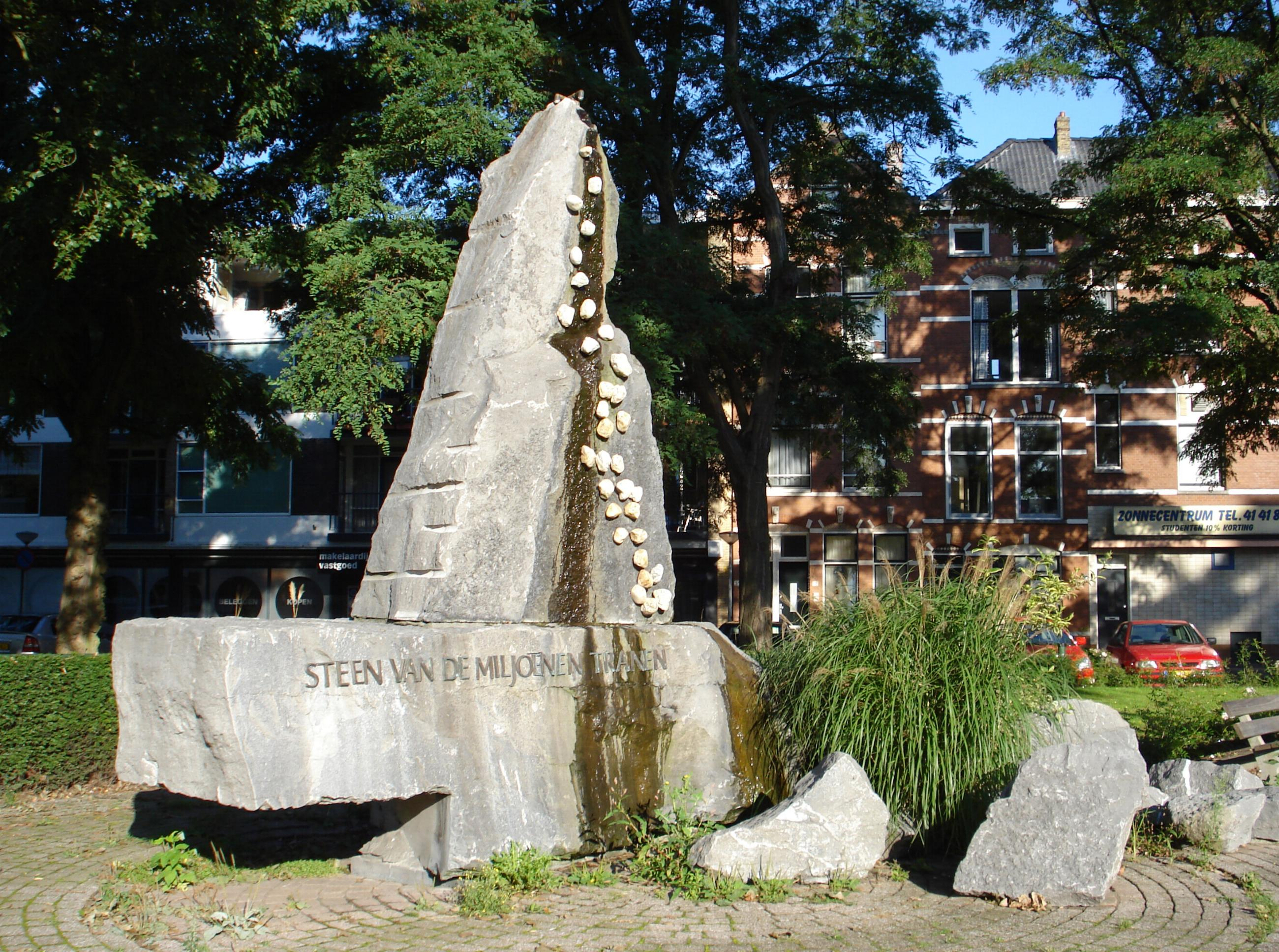 Rotterdam, Kralingen. Willem Ruyslaan, hoek Oude Dijk. Oorlogsmonument Steen van de miljoenen tranen. Rotterdam/The Netherlands.